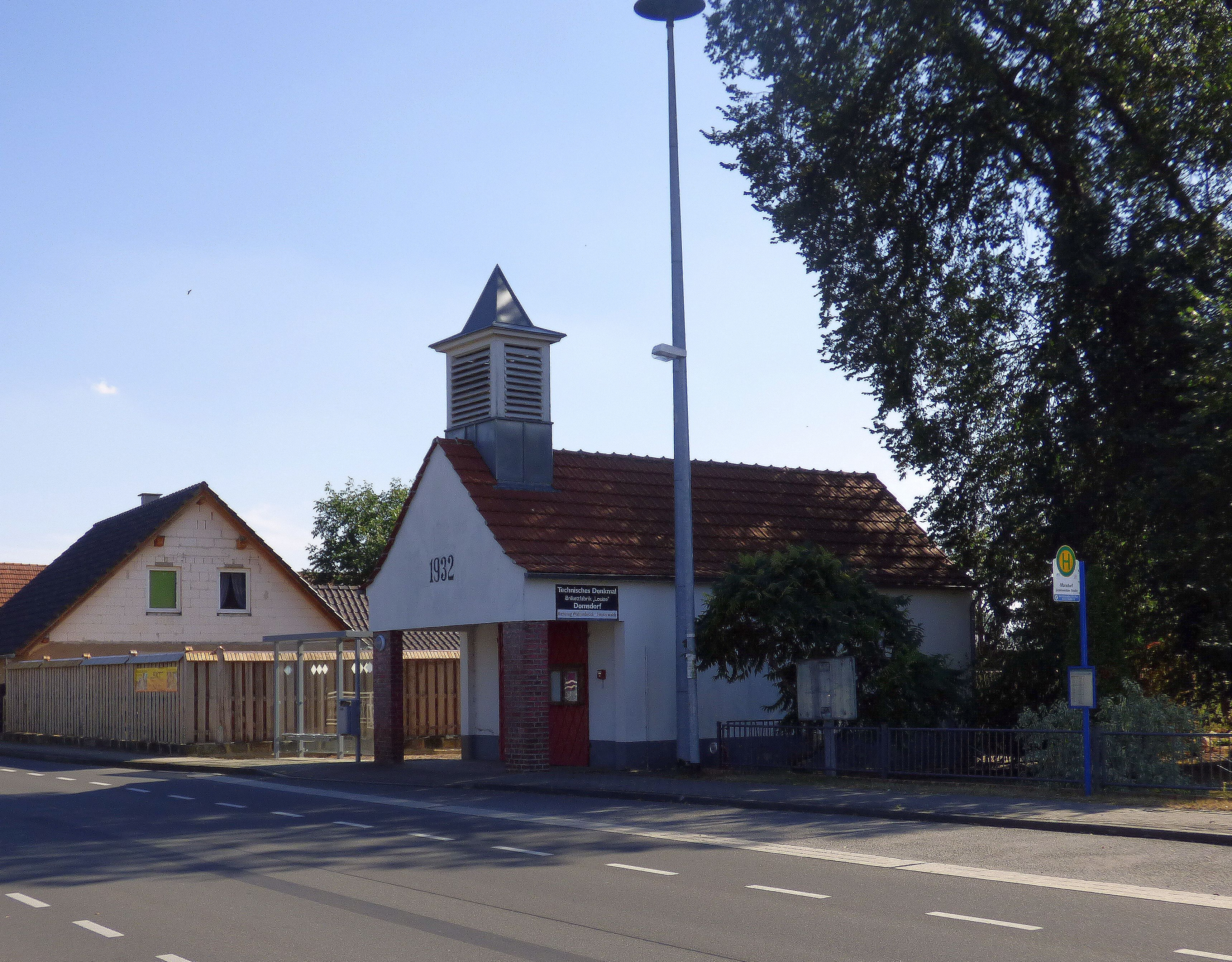 Marxdorf